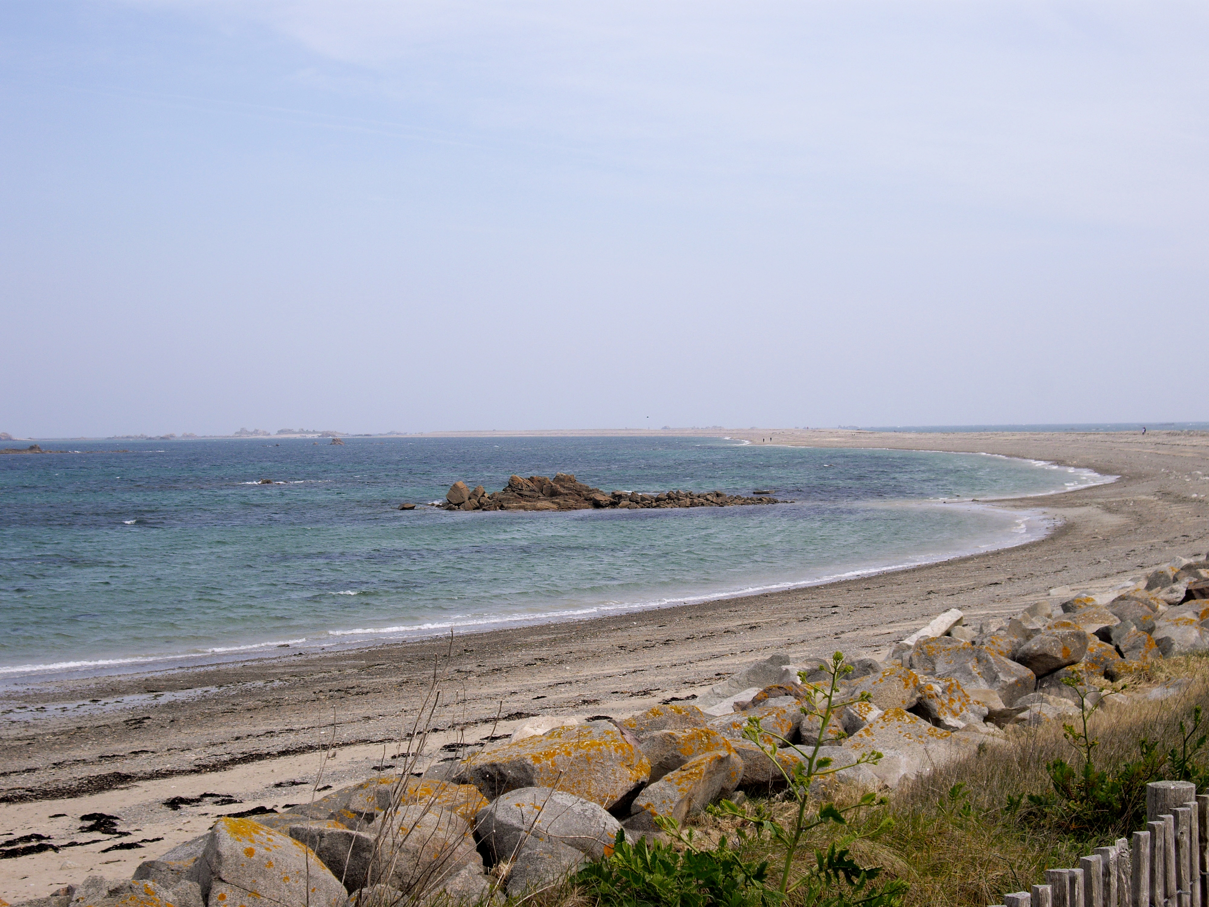 Sillon de Talbert (Pleubian, Côtes-d'Armor, France)